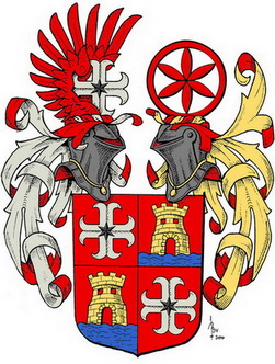 foto van hertekend wapen van het geslacht Van Basten Batenburg in opdracht van de Van Batenborgh Stichting te Groenlo.